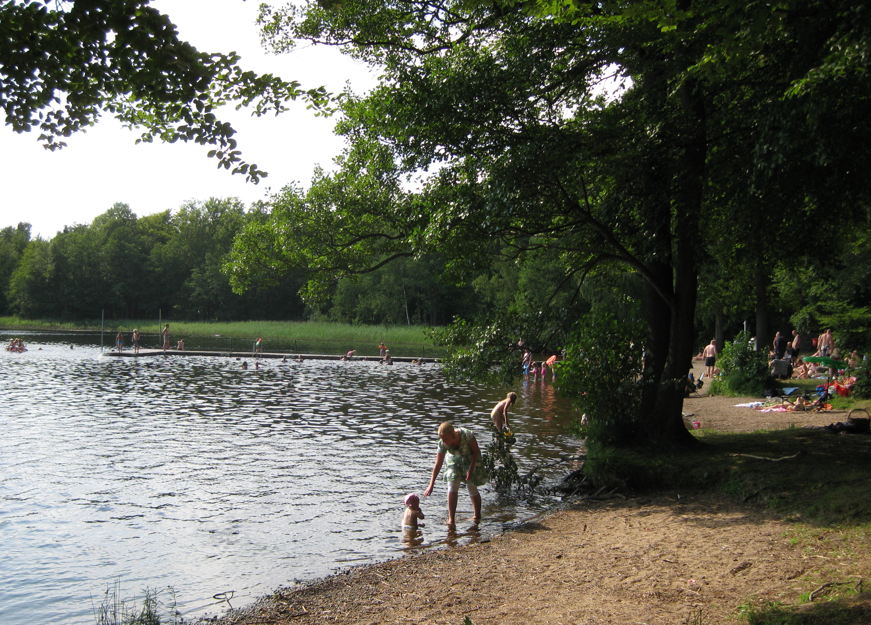 Bostarpasjöns badplats